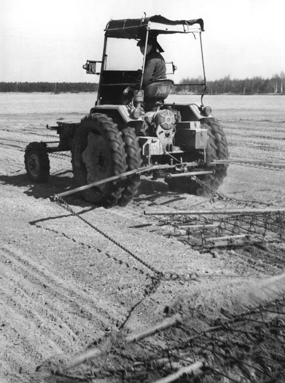 LPG Wernsdorf, Feldpflege Zentralbild Krueger At-1.4.1965 Schon am 29.März 1965 hatten die Genossenschaftsbauern der LPG "Neuland" in Wernsdorf, Kreis Fürstenwalde die Aussaat der Gerste und des Hafers abgeschlossen.Unser Bild zeigt den Traktoristen der LPG Richard Ostendorf, der mit seinem Geräteträger RS 09 einen Gerstenschlag abstriegelt.